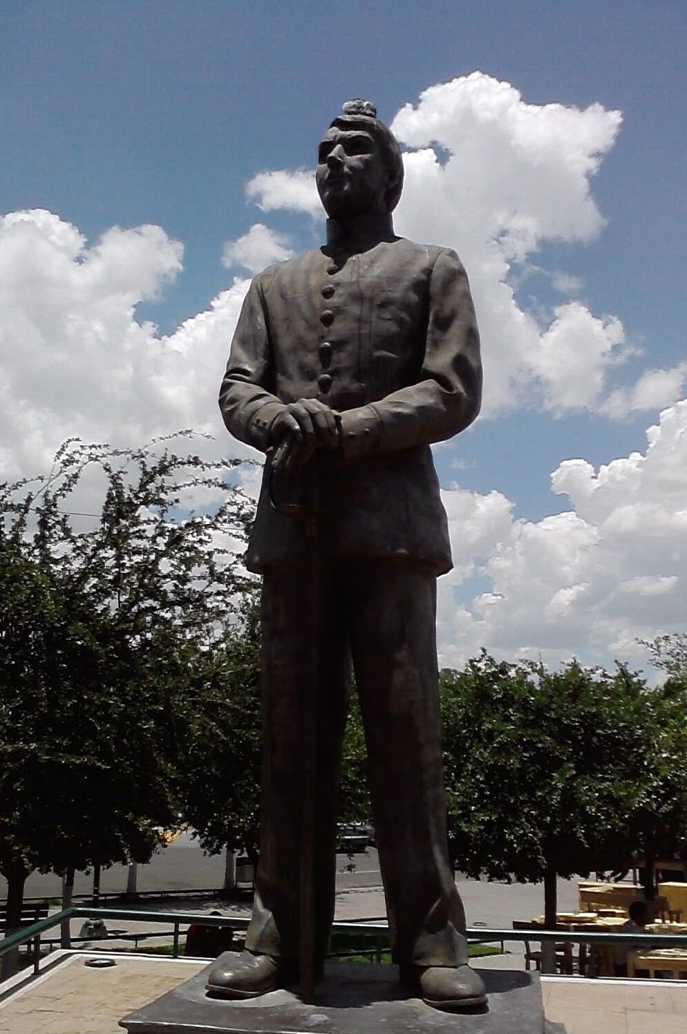 Monumento al Cadete Agustín Melgar Sevilla en Cd. Chihuahua